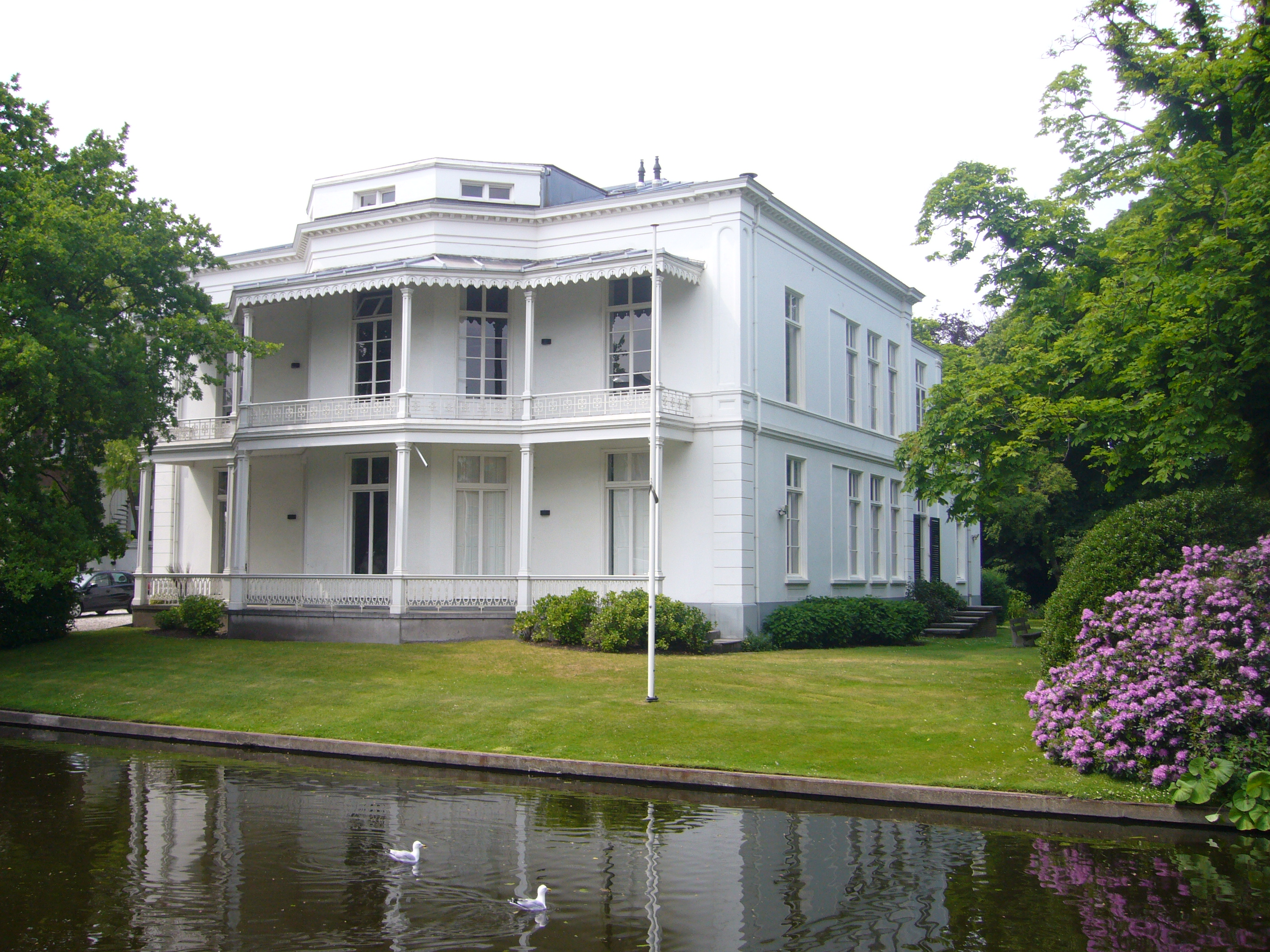 Alexanderstraat 1, Den Haag